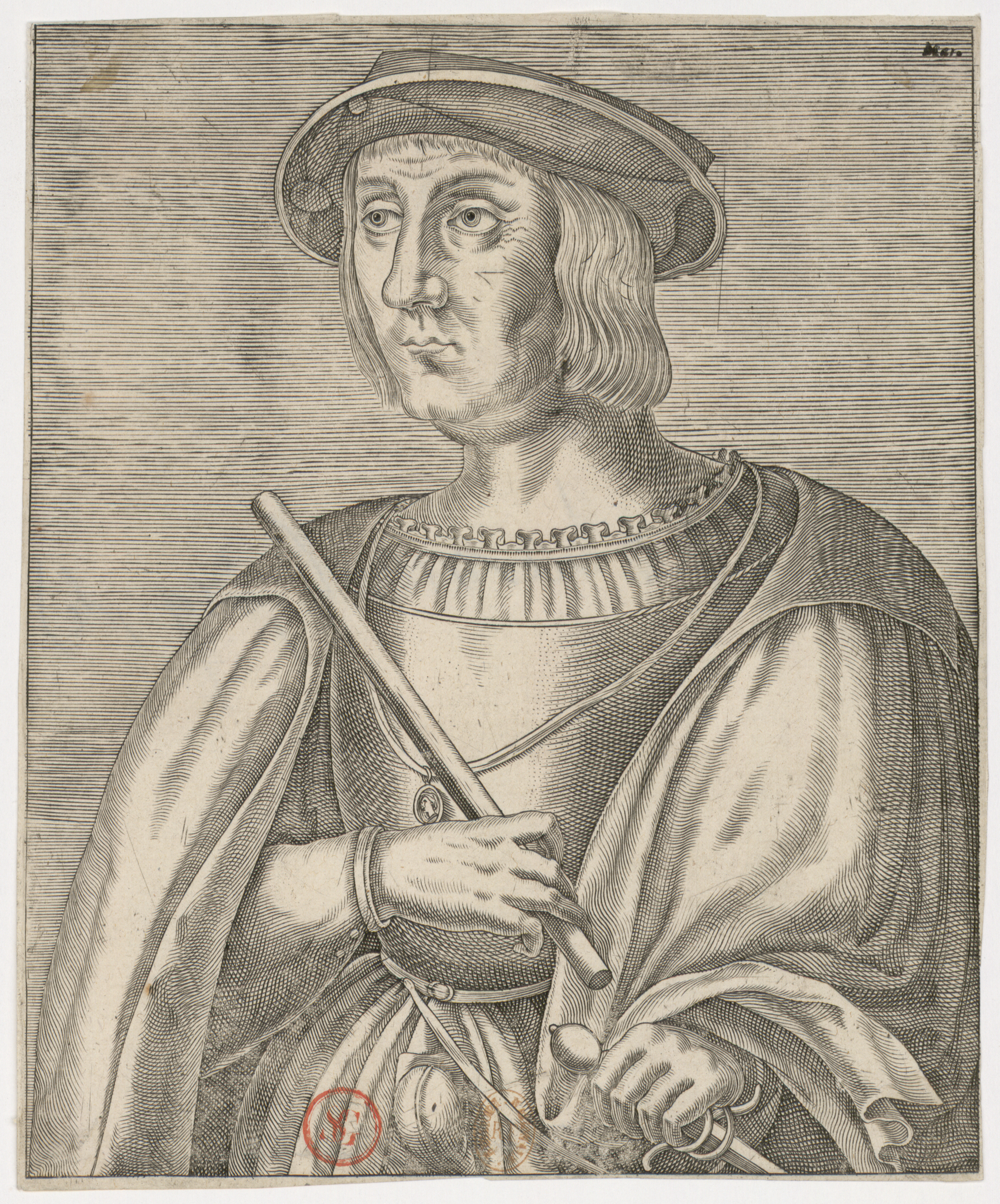 Jacques de Chabannes, seigneur de la Palice. Gravure ornant l'ouvrage d'André Thévet, Les vrais pourtraits et vies des hommes illustres grecz, latins et payens, 1584.